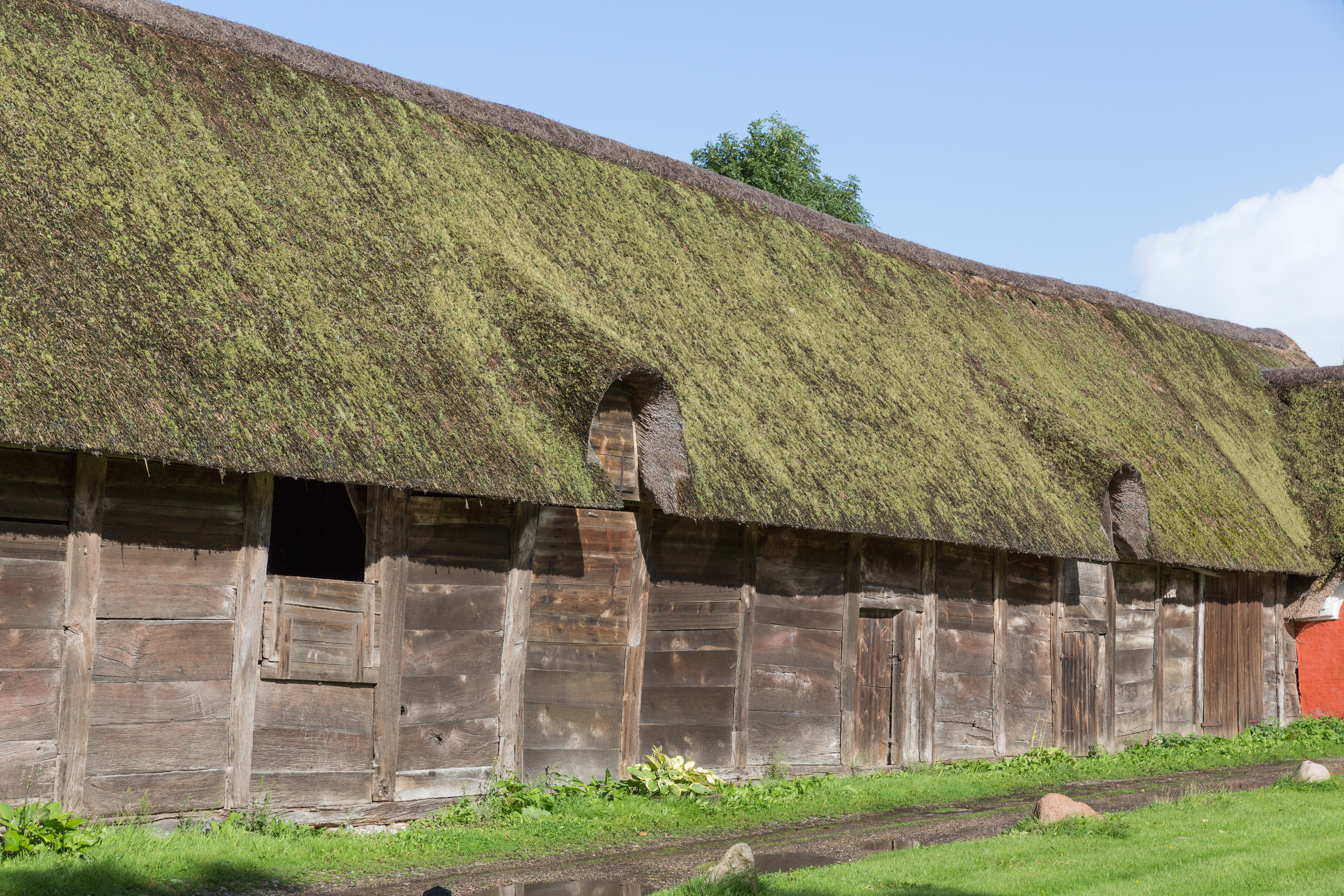 Bulladen ved Christiansfeld